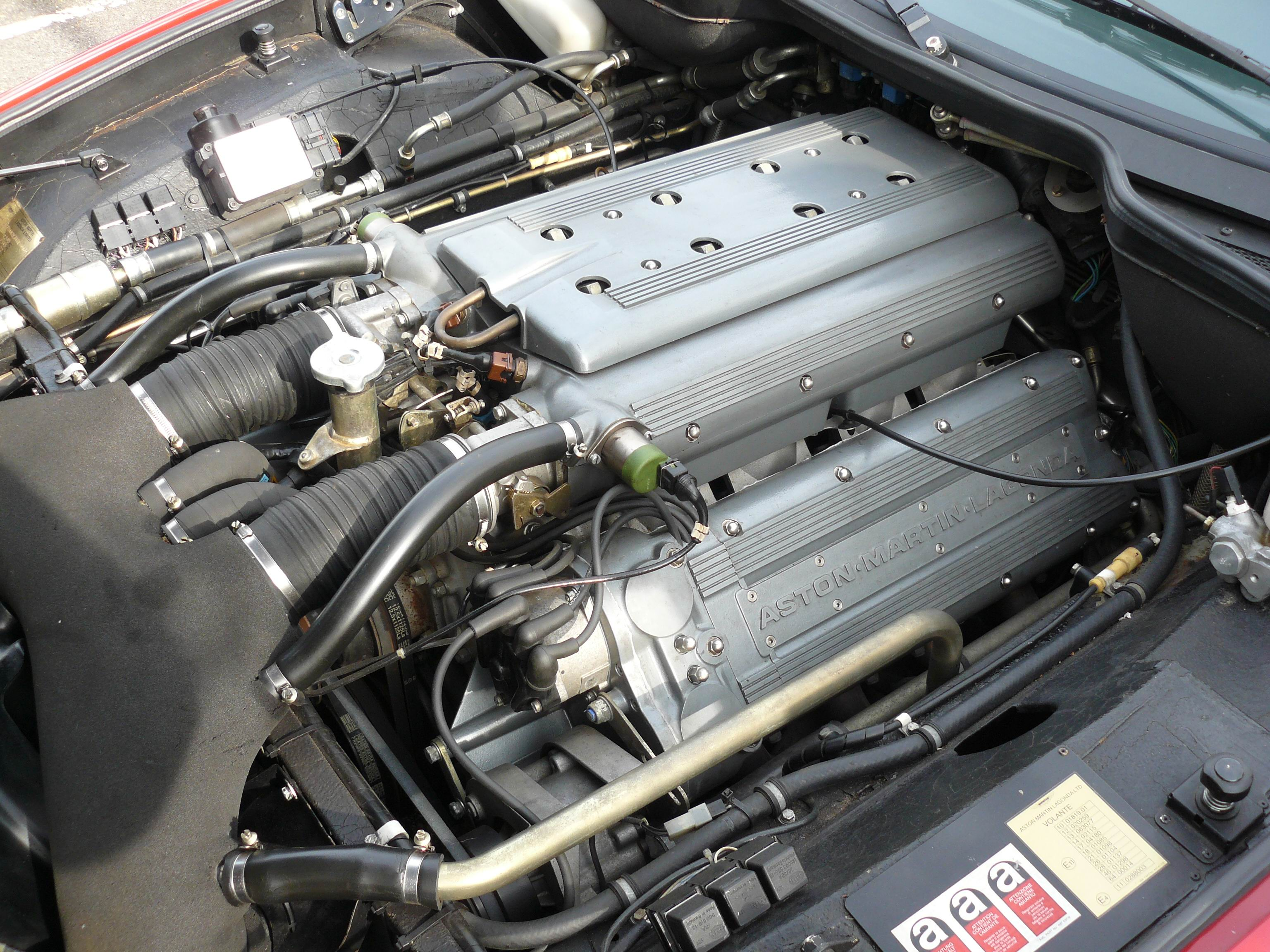 Bailly 2011.